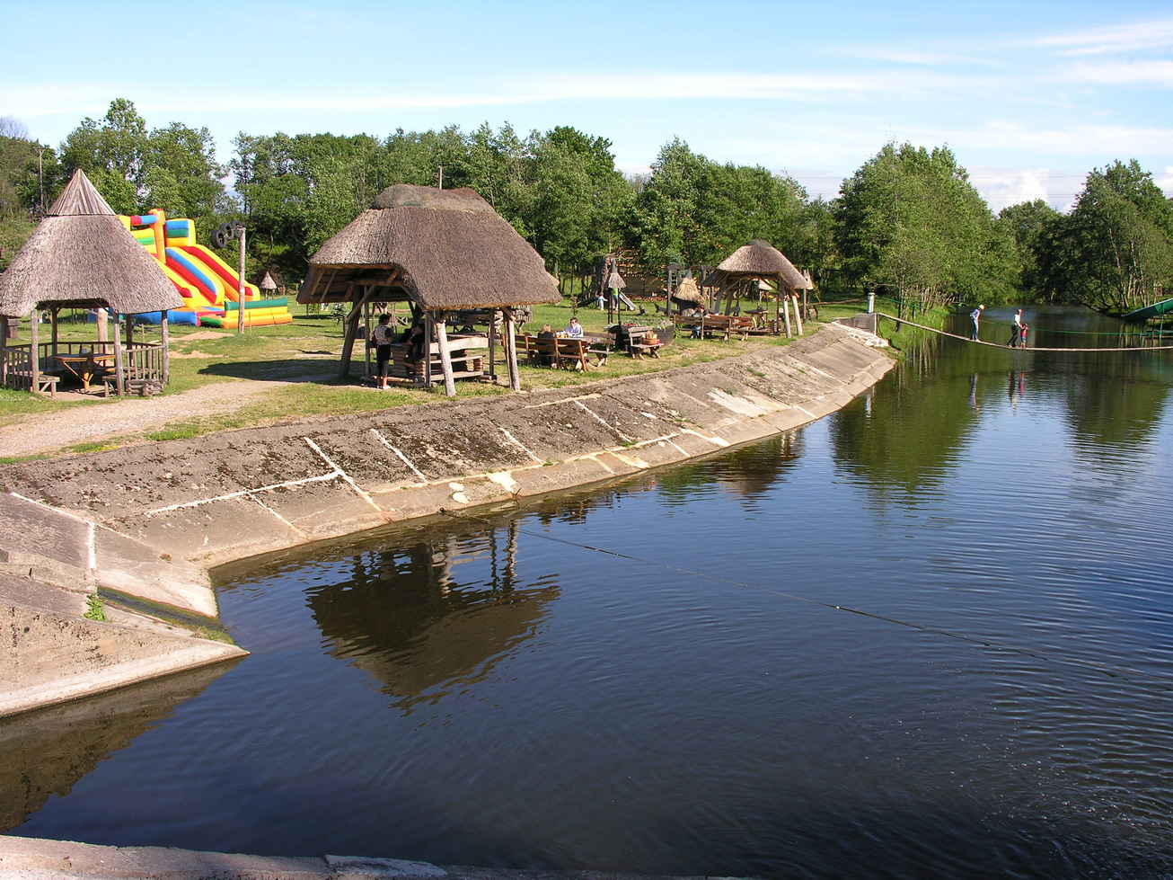 Padvariai, Kretingos raj.. Kaimo turizmo sodyba. Foto: Algirdas, 2006 m. birželio 29 d., lietuva